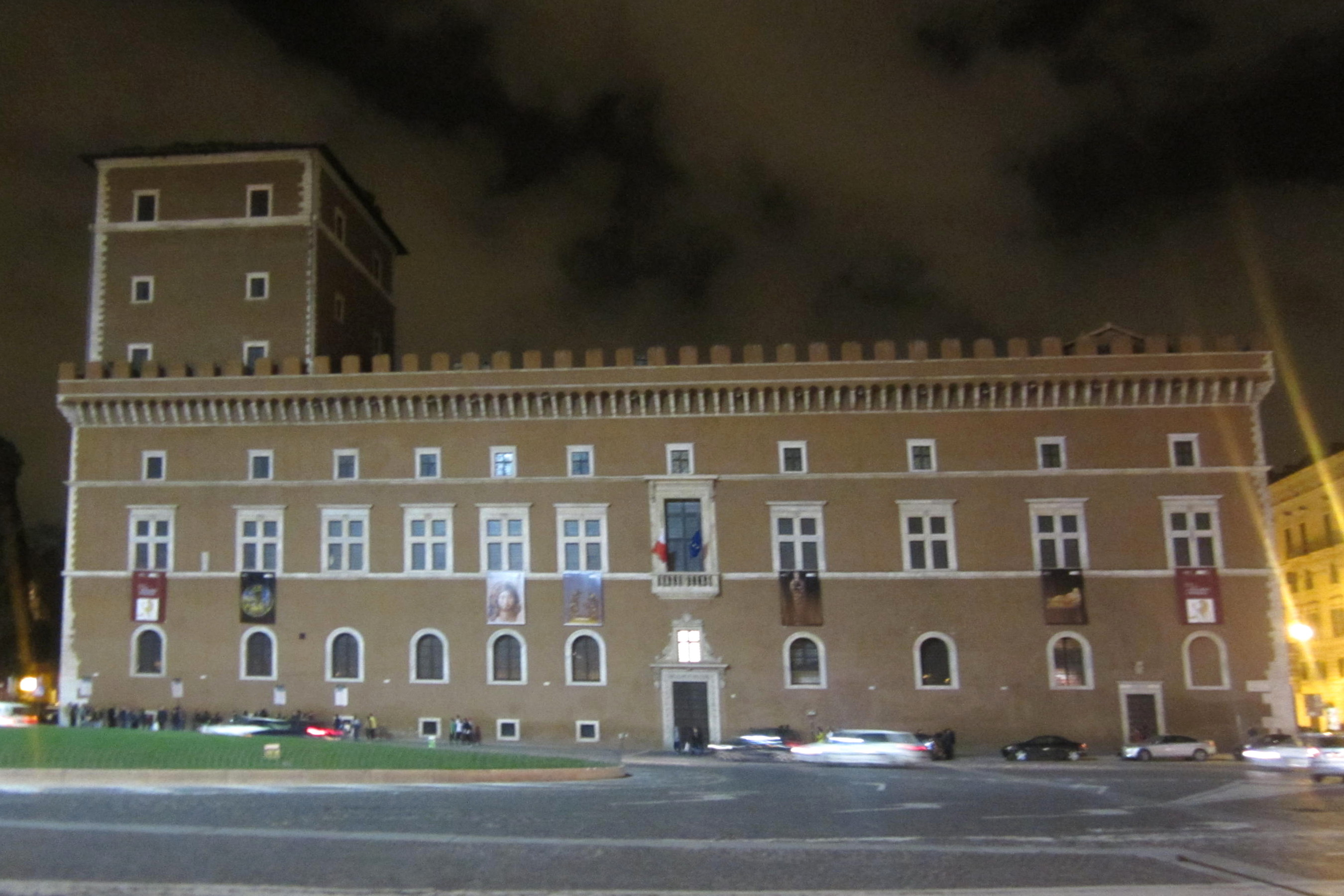 Palazzo Venezia, situato nell' omonima piazza